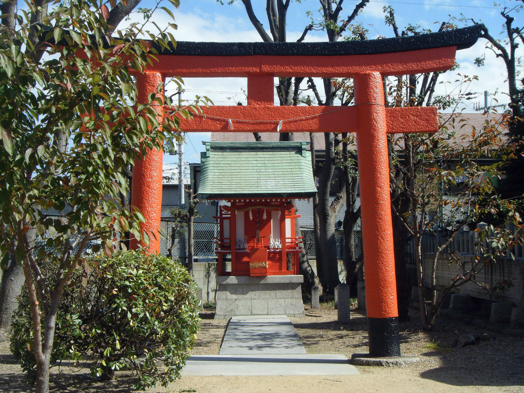 尼崎・大島神社 稲荷社